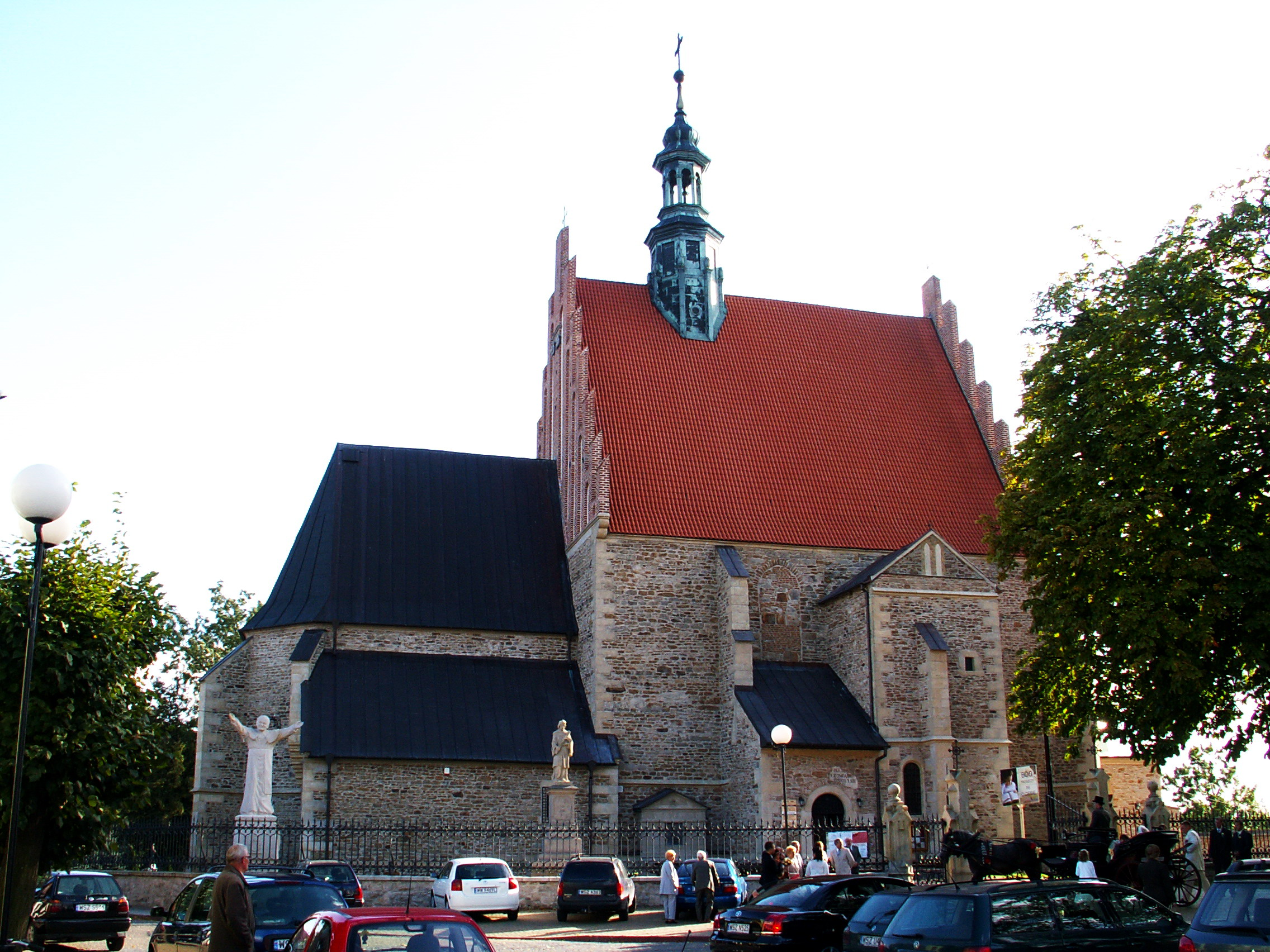 Kościół św. Zygmunta w Szydłowcu